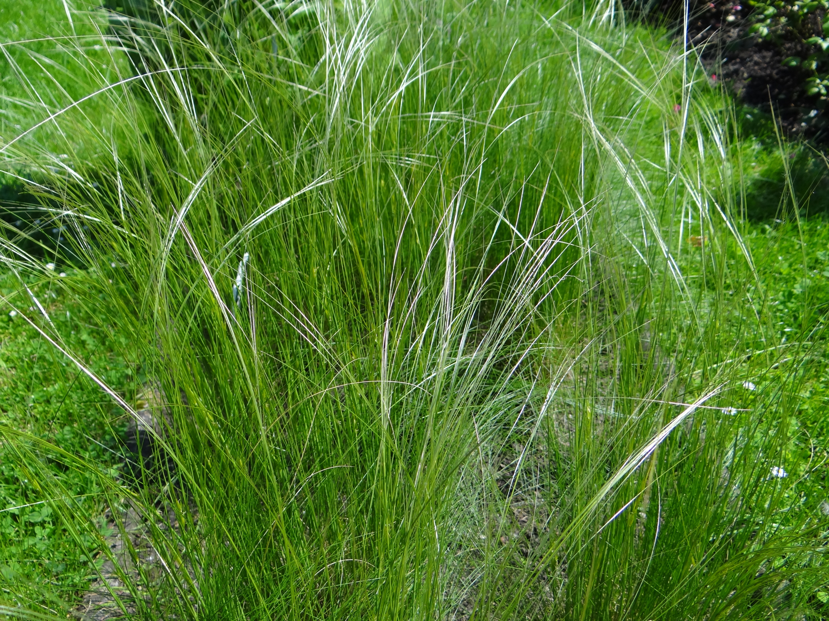 Stipa capillata (location:Botanical Garden in Cracow)